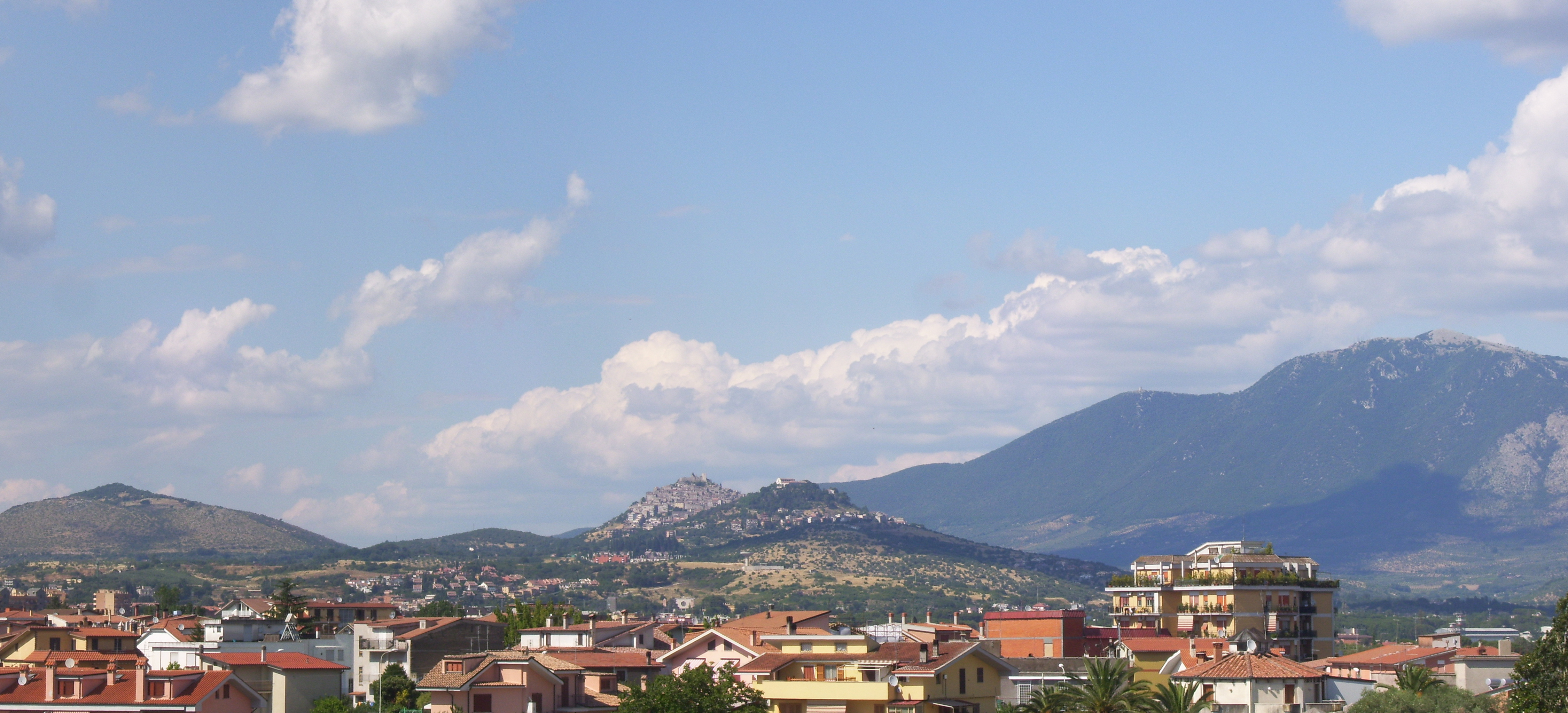 Panorama di Guidonia Montecelio da Colle Fiorito. In primo piano le abitazioni di Colle Fiorito vecchio e Guidonia, sullo sfondo Montecelio.